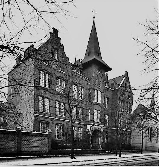 Alexianerkloster um 1900, Hauptgebäude (Clemensbau) mit ehemaliger Klosterkapelle (rechts)